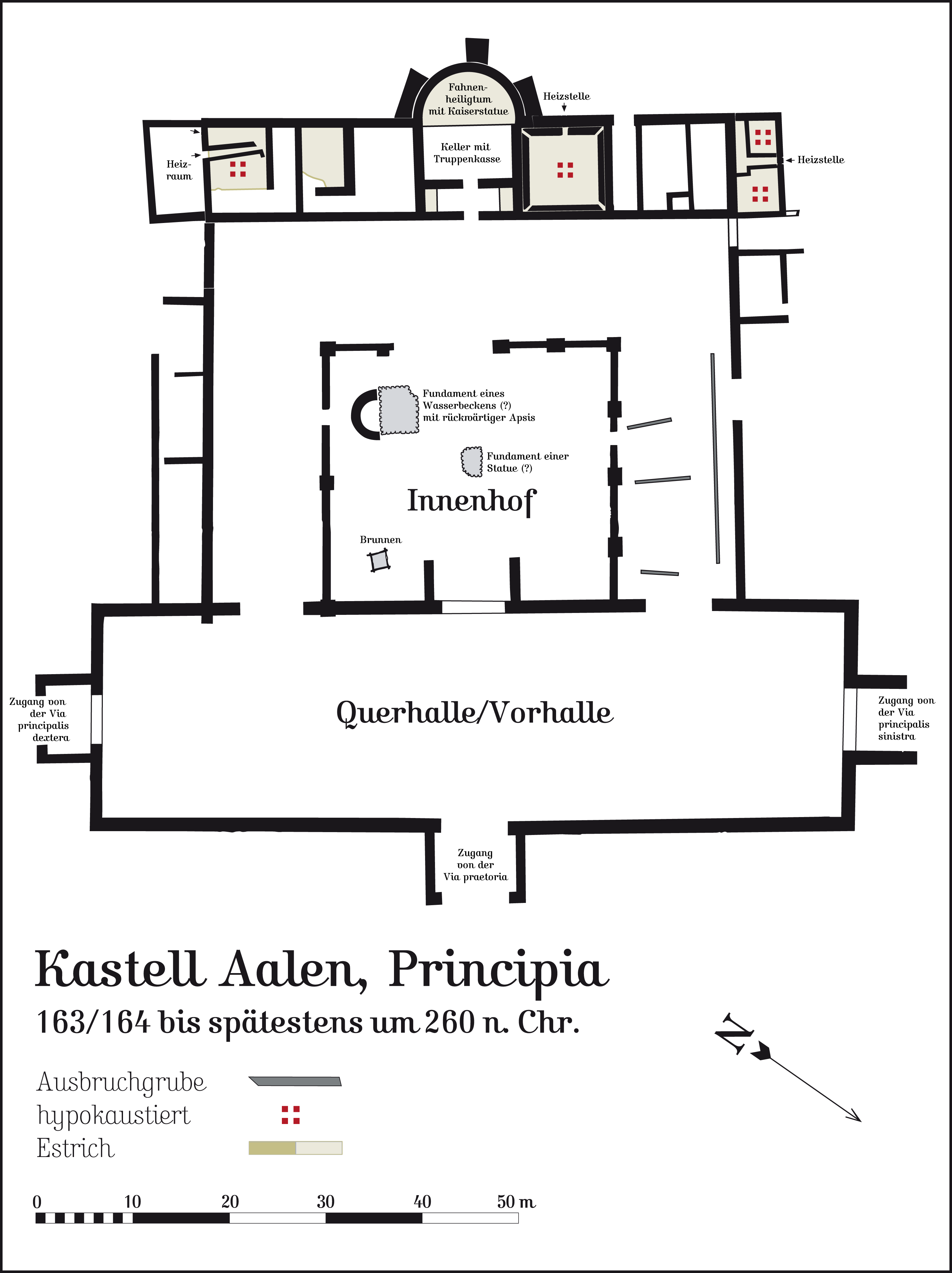 Principia im limesnahen Reiterkastell Aalen, Baden-Württemberg. Hergestellt am Macintosh unter Macromedia Freehand MX; abgespeichert für Wikipedia unter Adobe Photoshop CS 2.